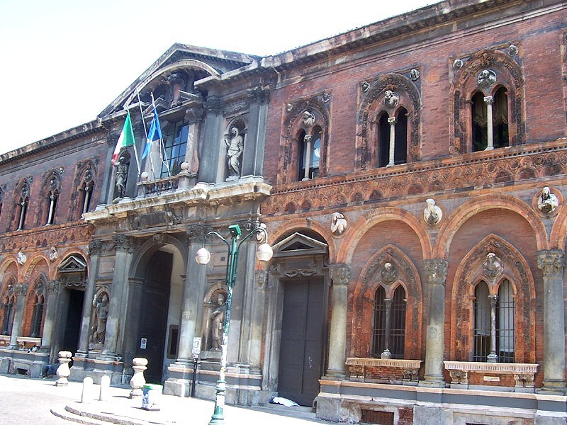 Milano - Cà Granda (Università Statale)